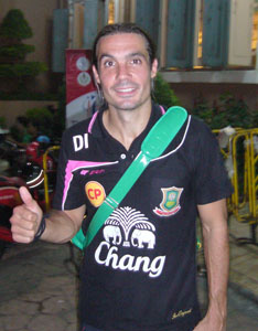 Danny Invincibile